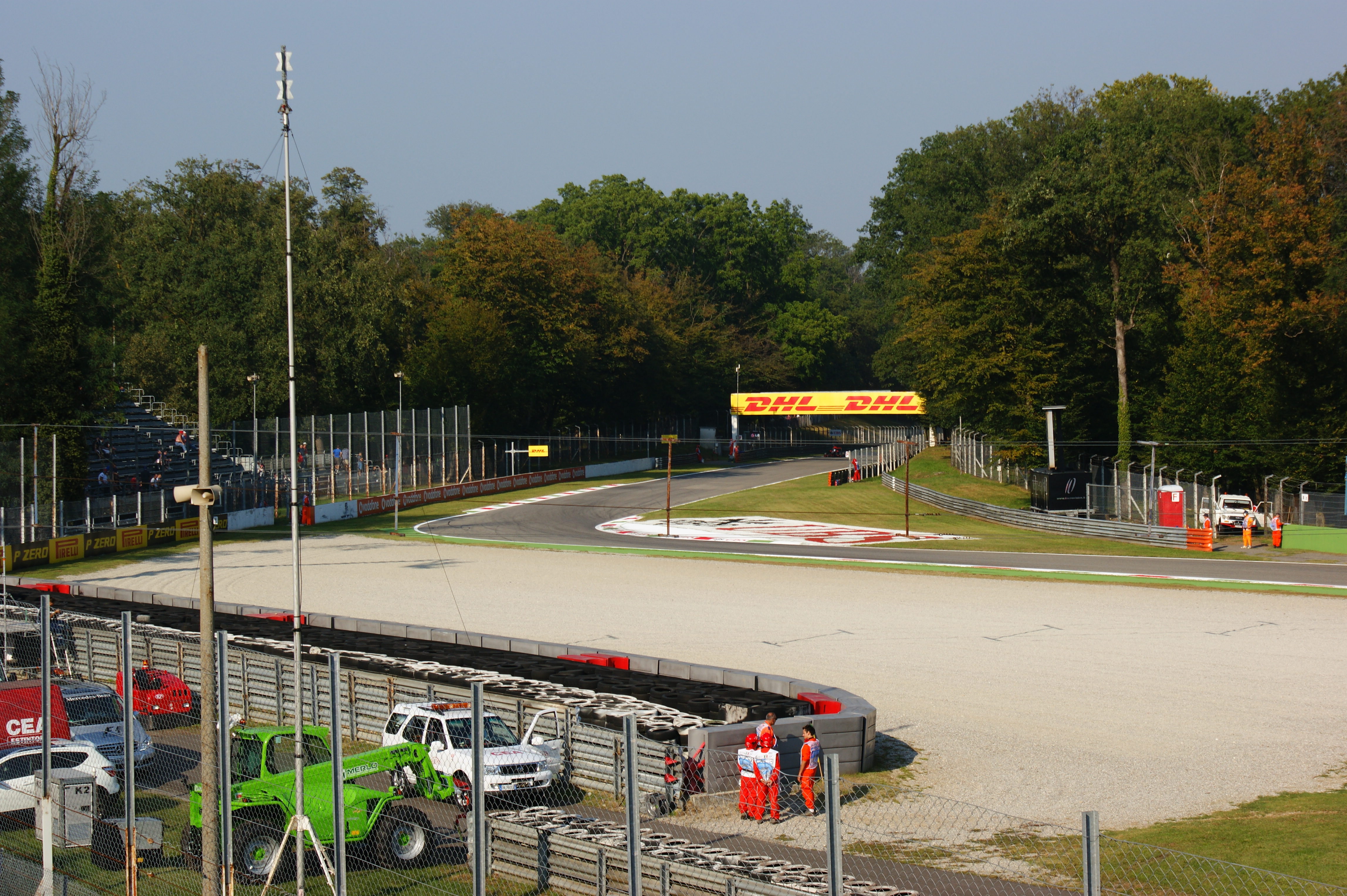 L'ingresso alla variante Ascari di Monza nel 2011